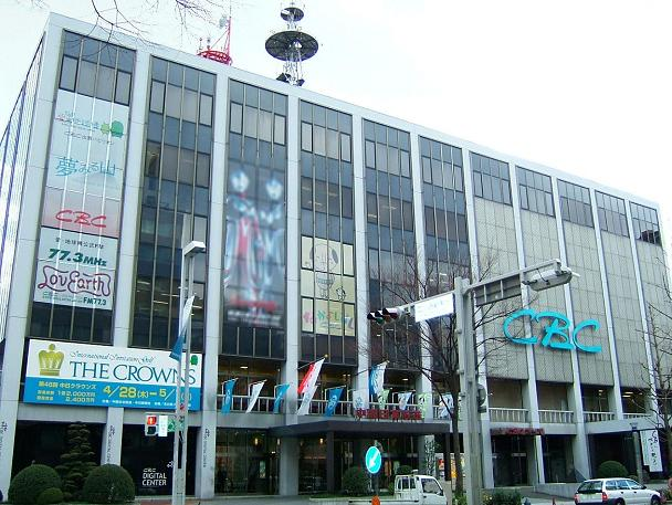 名古屋市中区新栄に所在する中部日本放送(CBC)の本社社屋（CBC会館）。 投稿者:Gnsin 撮影日&場所:2005年1月31日、名古屋市中区の中部日本放送本社前にて撮影。